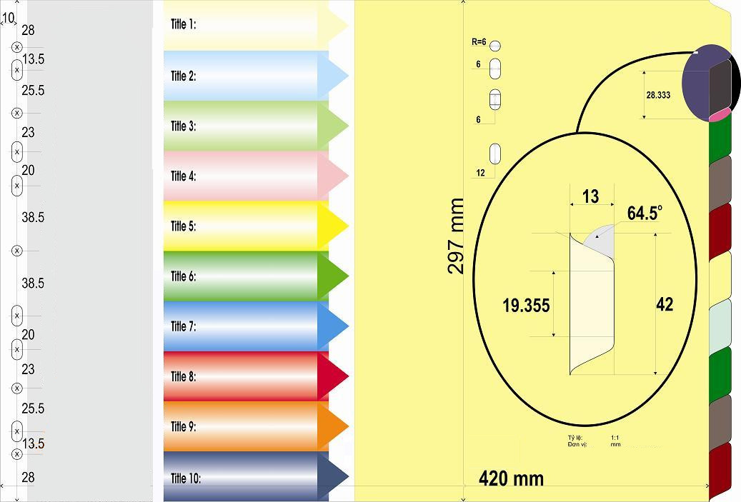 Index divider